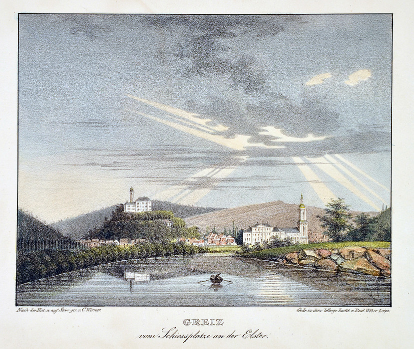 Greiz vom Schiessplatze an der Elster, aus: C. Werner: XII Ansichten von Greiz. (Leipzig, Magazin für Literatur, 1838).